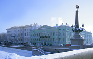 Санкт-Петербургский государственный университет культуры и искусств (СПбГУКИ). Зимняя фотография. Здание построено в 1784-1788 году, архитектор - Джакомо Кваренги